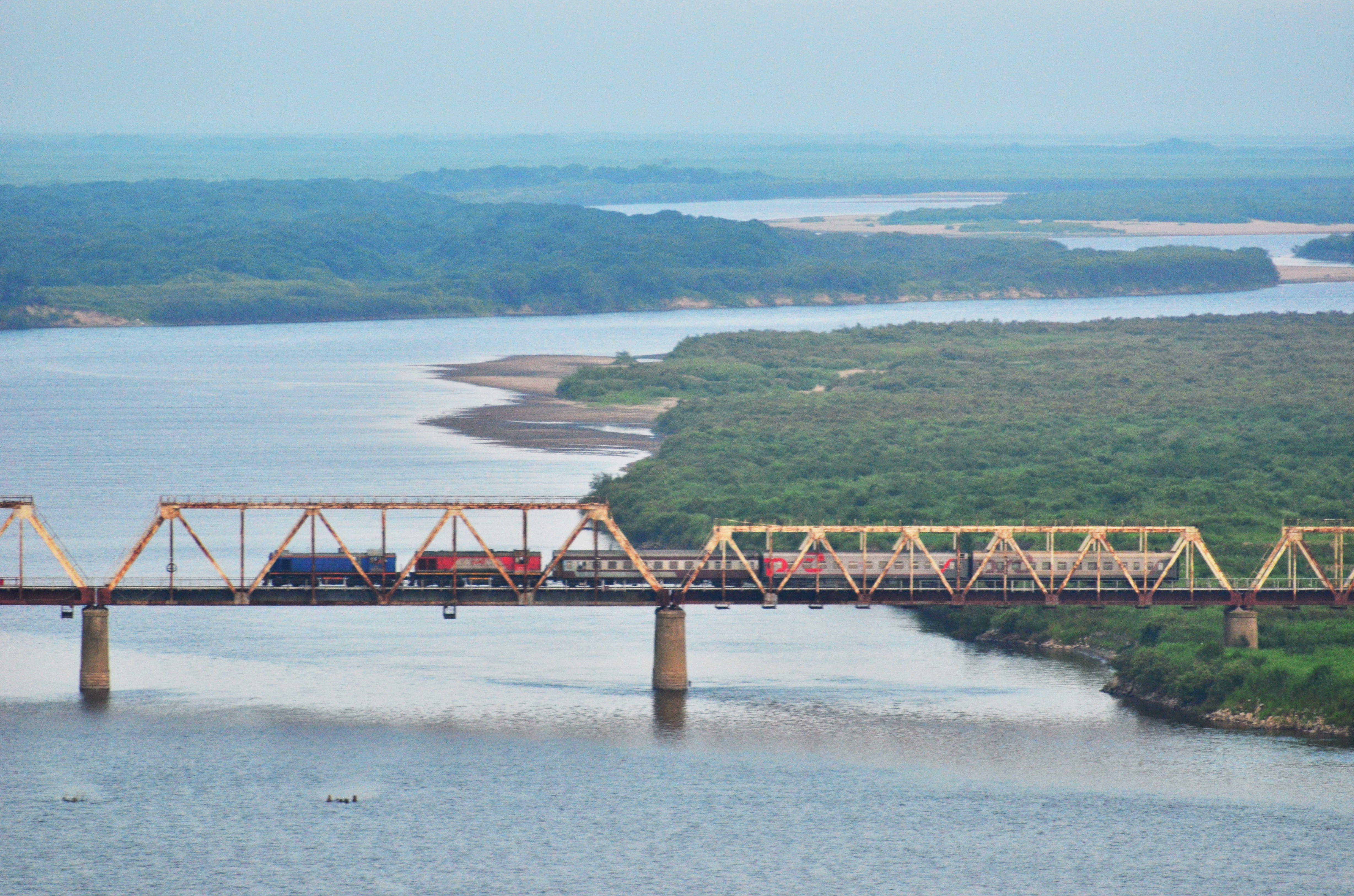 国际客运列车在图们江铁路桥上行驶，离开朝鲜进入俄罗斯